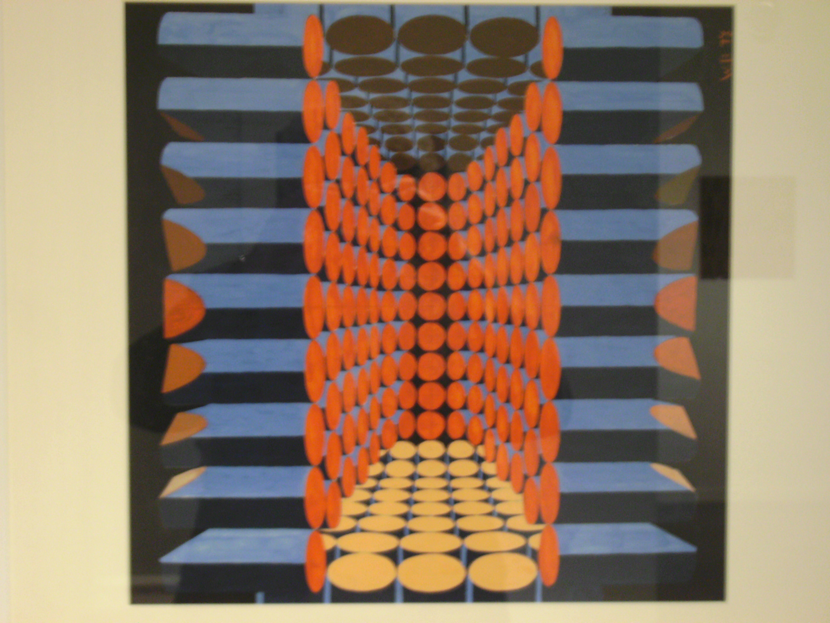 Kunstwerk Werner Bauer: o.T. 1973 (Gouache) (Mail vom Uploader mit Genehmigung des Künstlers im Anhang)